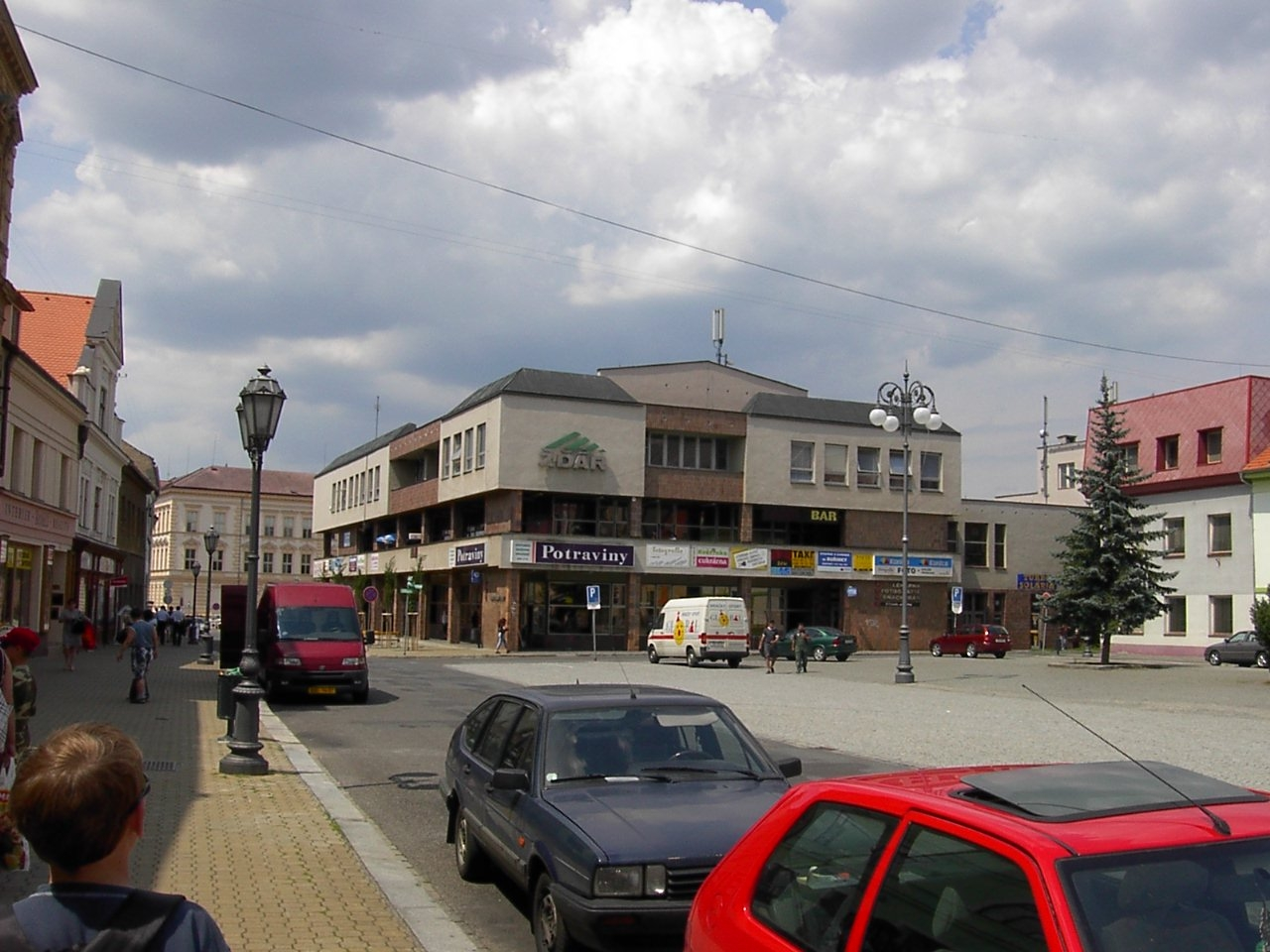 Nákupní středisko Žďár na rokycanském náměstí.